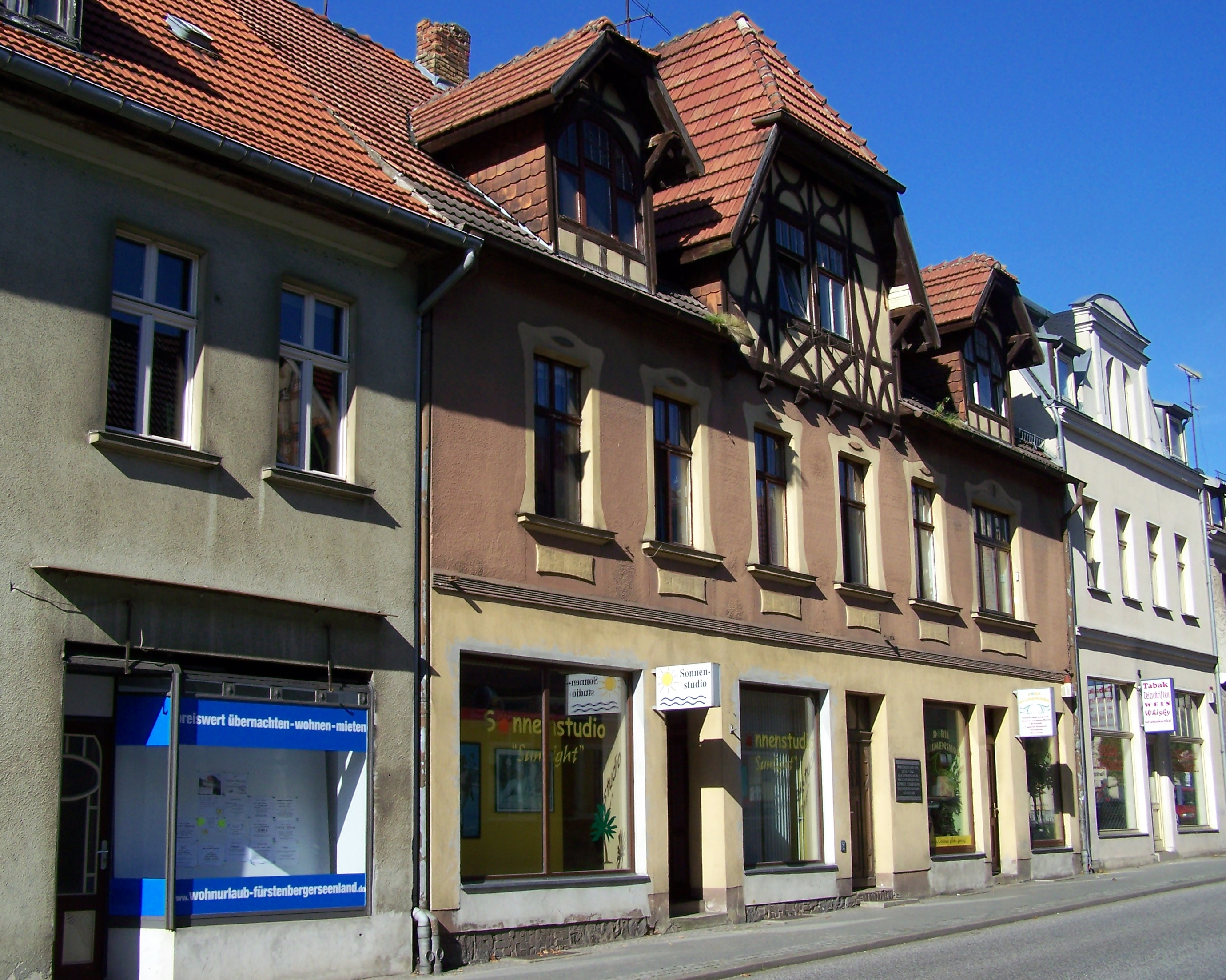 Schhliemann-Haus in Fürstenberg/Brandenburg. Der Altertumsforscher Heinrich Schliemann lebte hier von 1836 bis 1841.